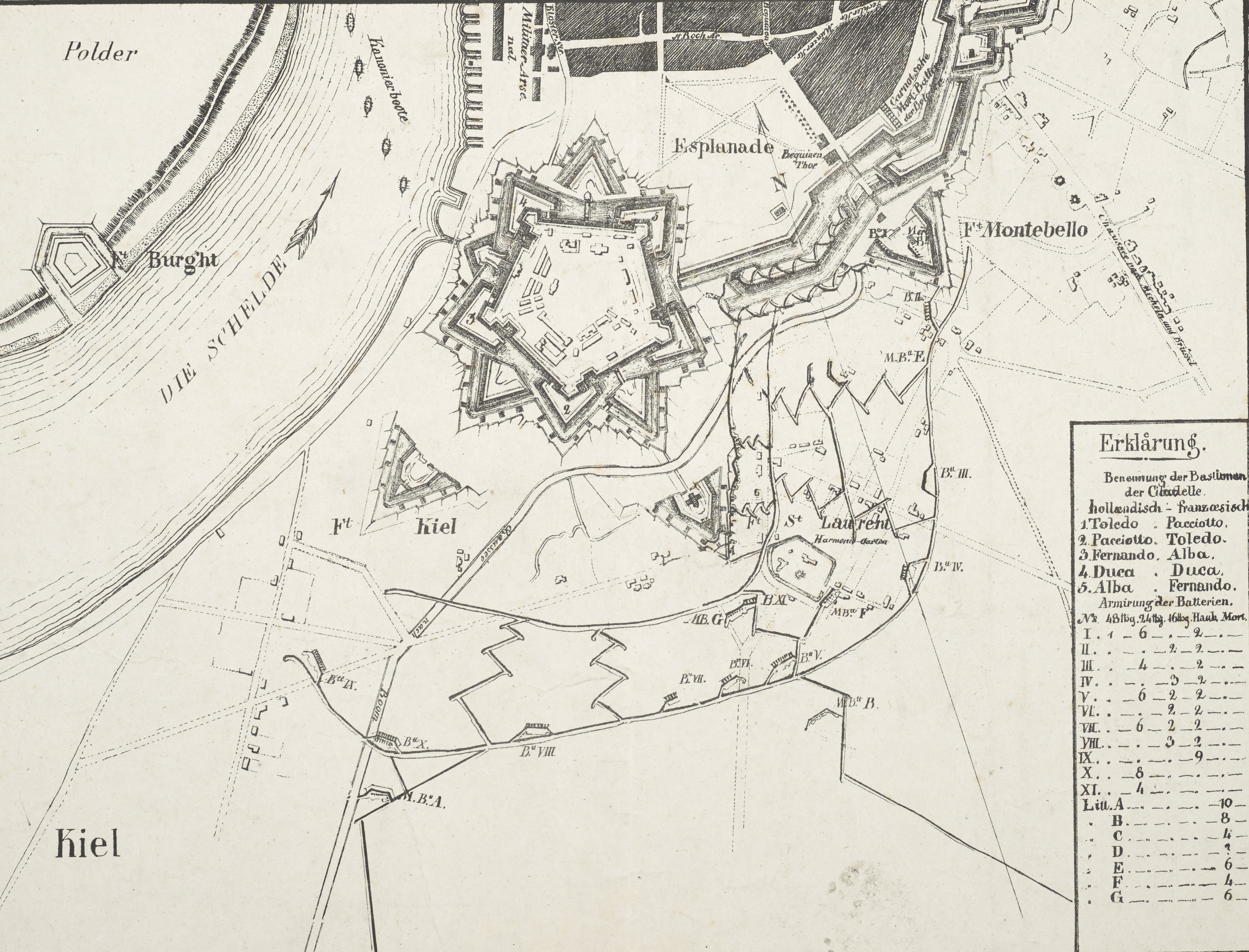 1832 : unkolor. (36 x 27 cm) ; Koordinaten E 4°22'21"-E 4°25'21"/N 51°12'47"-N 51°11'17" ; Maßstab in graph. Form (Mètres, Toisen, Ruthen rheinl.). - Titel oberhalb des Kt.-Feldes. - Maßstab unterhalb des Kt.-Netzes. - Legende unten rechts. - Ohne Kt.-Netz. - Ohne Geländedarst. - Ohne Relief